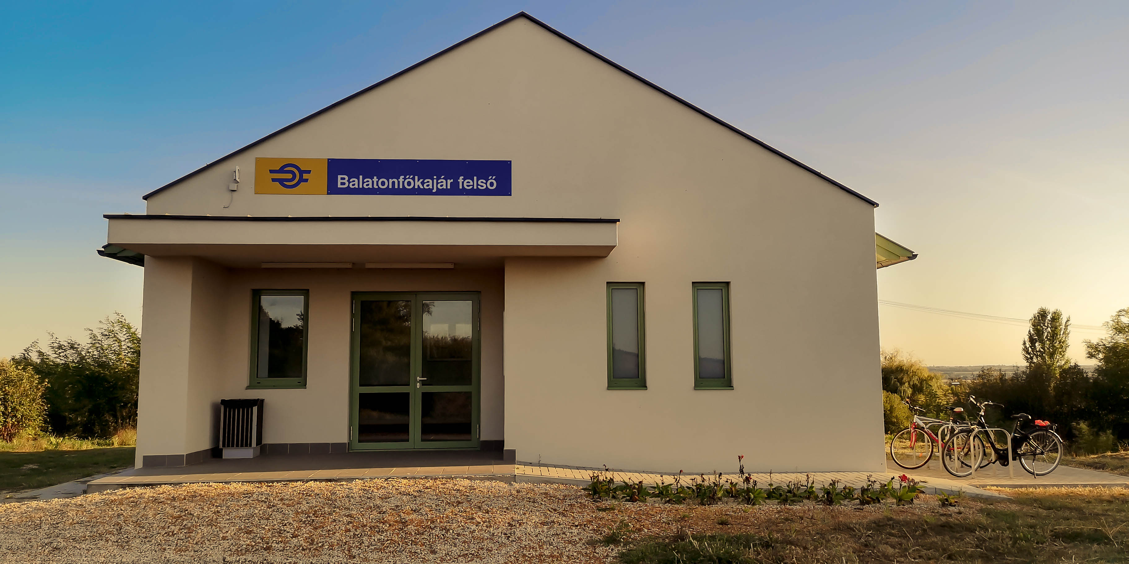 A felújított váróterem Balatonfőkajár felső vasúti megállóhelyen